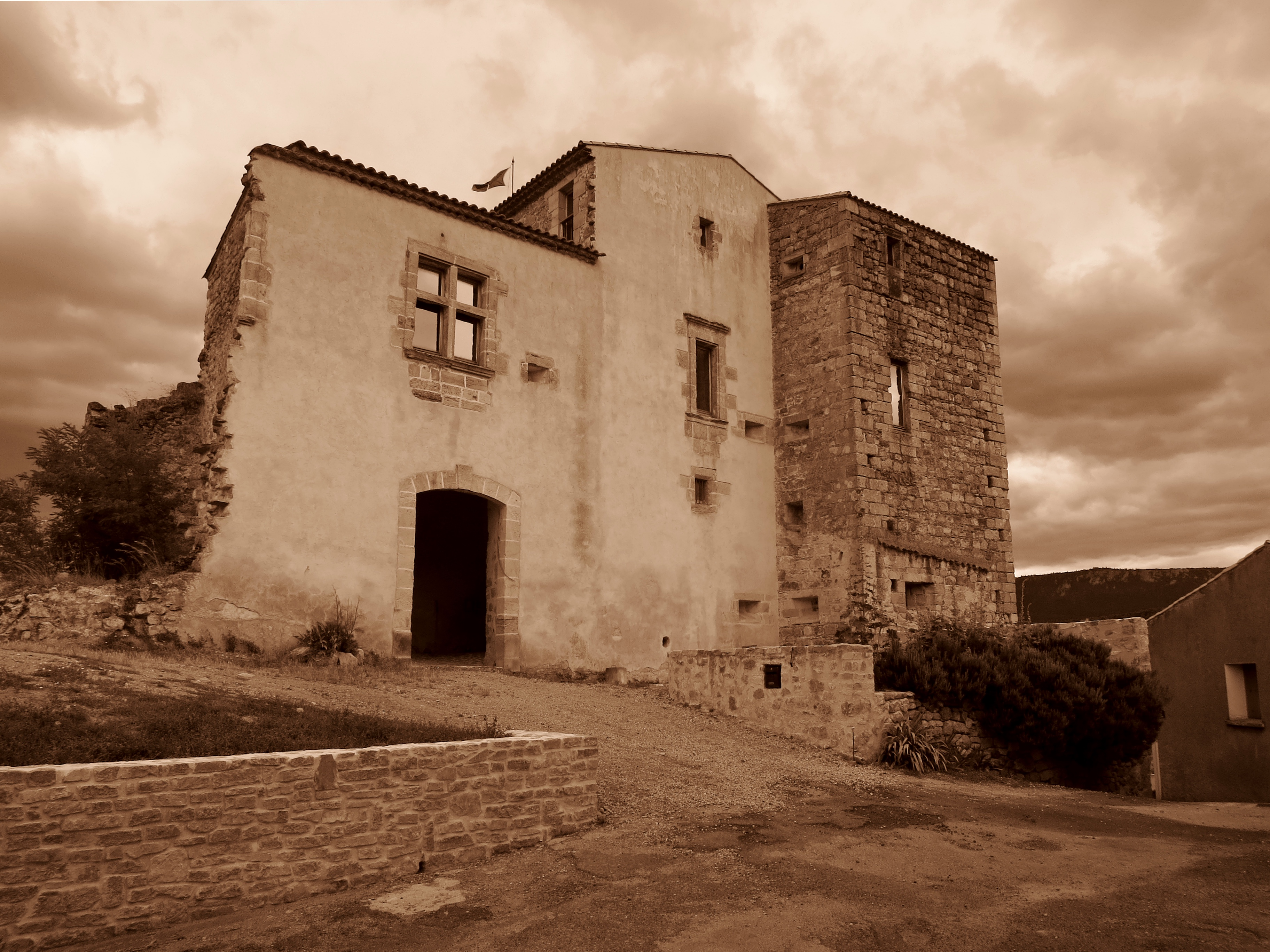 Sant Ferriòl (Aude, França) - Castèl de Sant Ferriòl